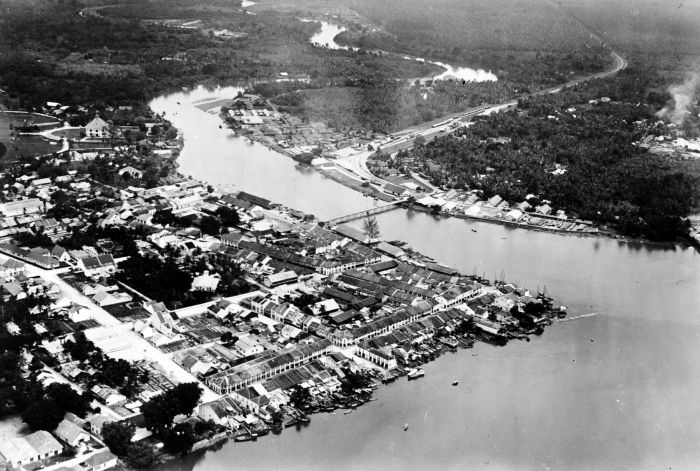 Repronegatief. Luchtfoto van Tandjoengbalai